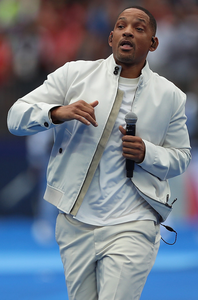 Уилл Смит, Гризманн, Модрич и кубок мира - в Москве прошёл финал ЧМ-2018